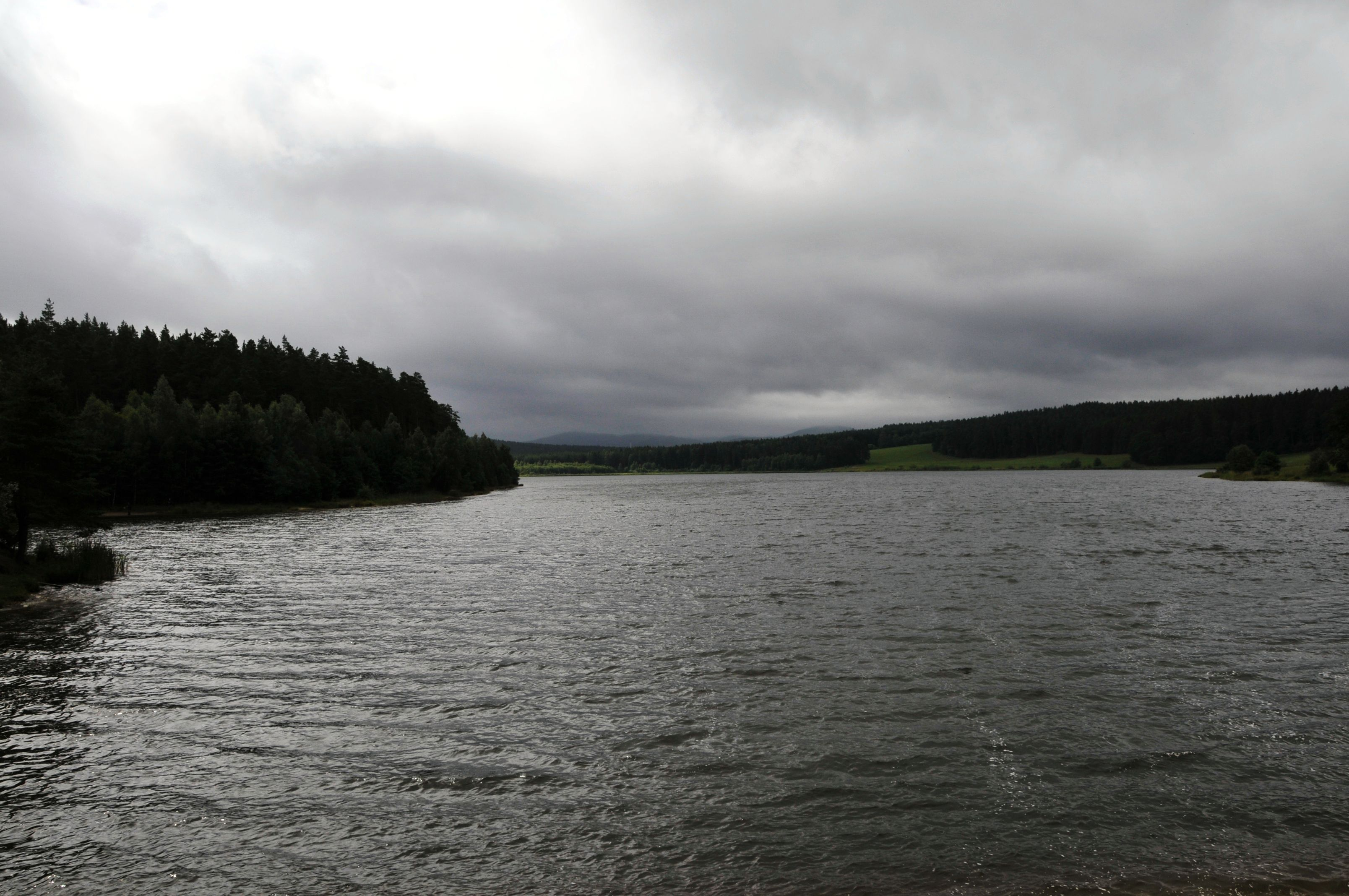 Heyda-Talsperre